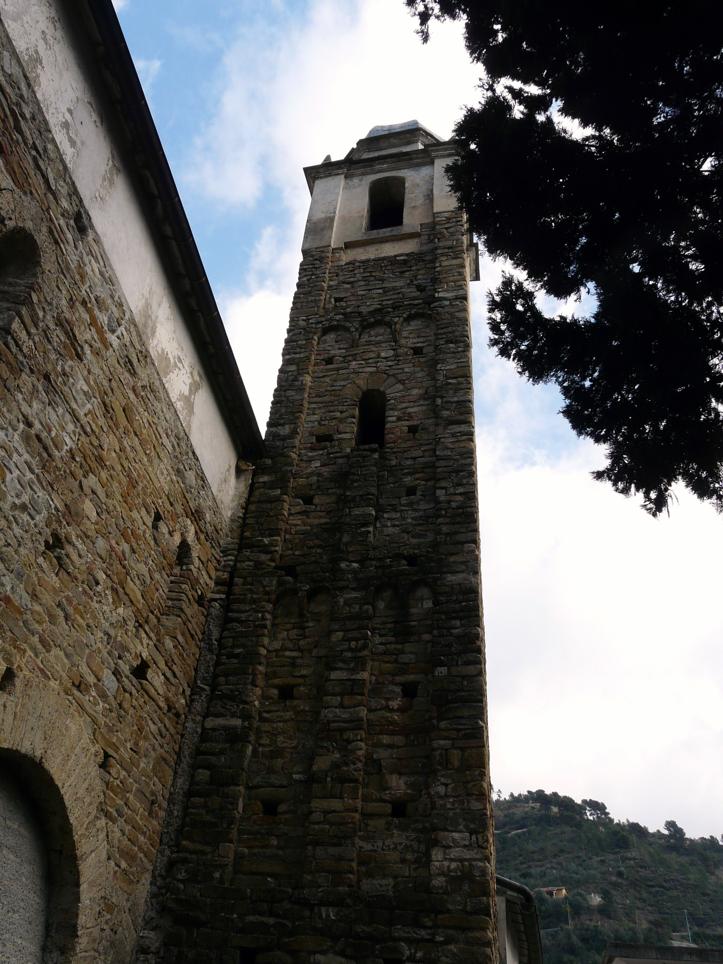 Campanile della chiesa di San Giorgio, Dolceacqua, Liguria, Italia